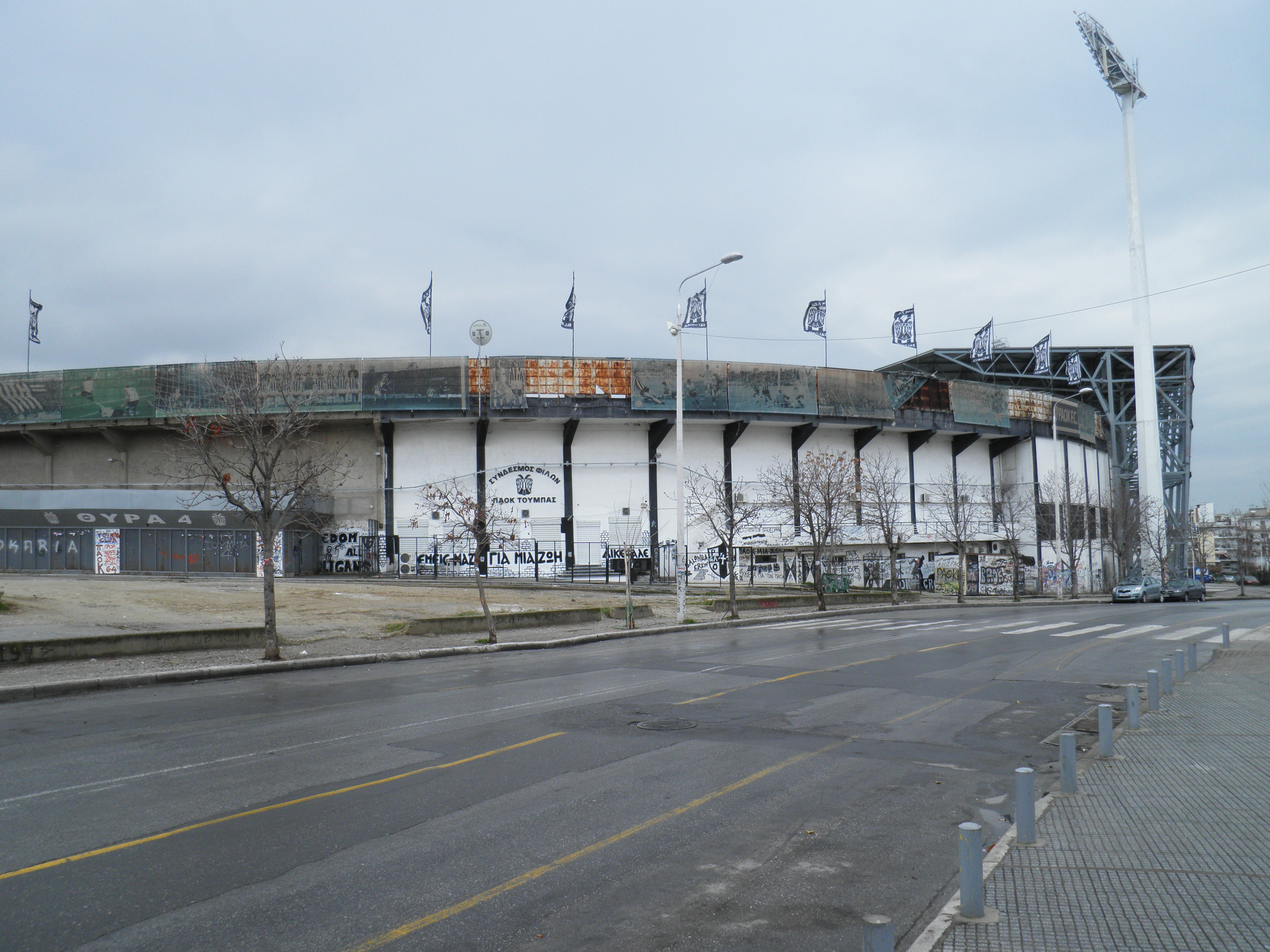 Tumba stadium